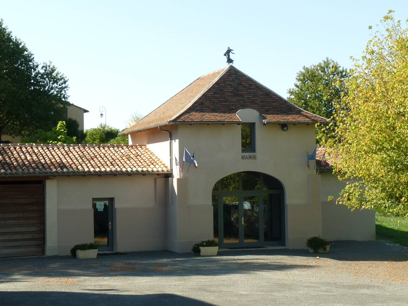 mairie de Vendoire (24), France